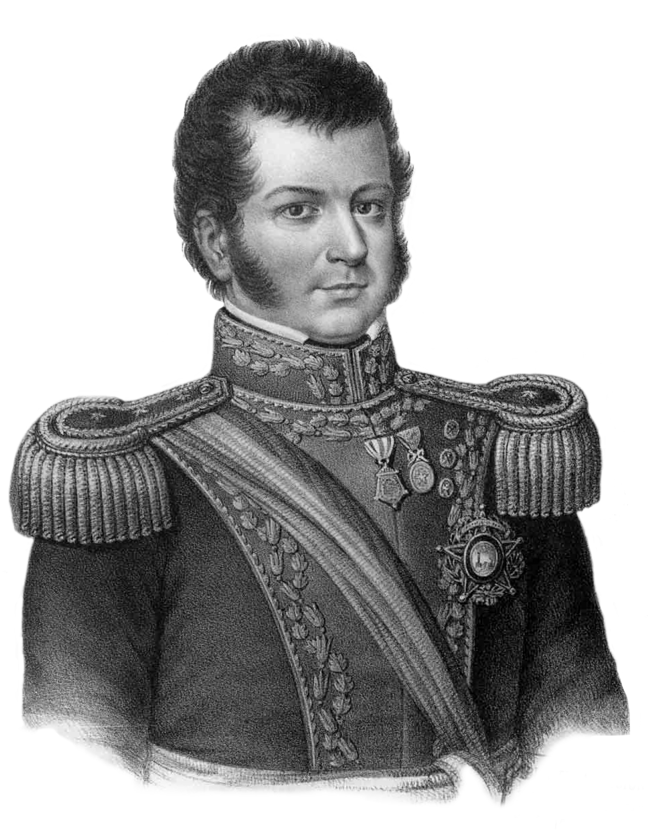 Bernardo O'Higgins Riquelme (Chillán, 20 de agosto de 1778 – Lima, 24 de enero de 1842) fue un político y militar chileno. Fue una de las figuras militares fundamentales de la independencia de su país y de Latinoamérica. Fue el primer jefe de Estado de la República de Chile bajo el título de director supremo entre 1817 y 1823, cuando renunció voluntariamente al cargo para evitar una guerra civil, exiliándose en el Perú hasta su muerte. Fue capitán general del Ejército de Chile, brigadier de las Provincias Unidas del Río de la Plata, general de la Gran Colombia y uno de los principales organizadores de la Expedición Libertadora del Perú.